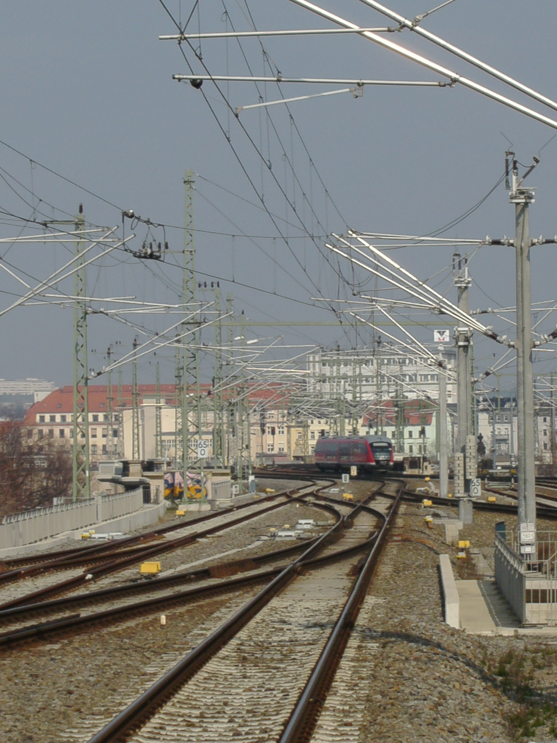 Nördliches Gleisfeld des Bahnhofs Dresden Mitte mit der Auffahrt zur Marienbrücke